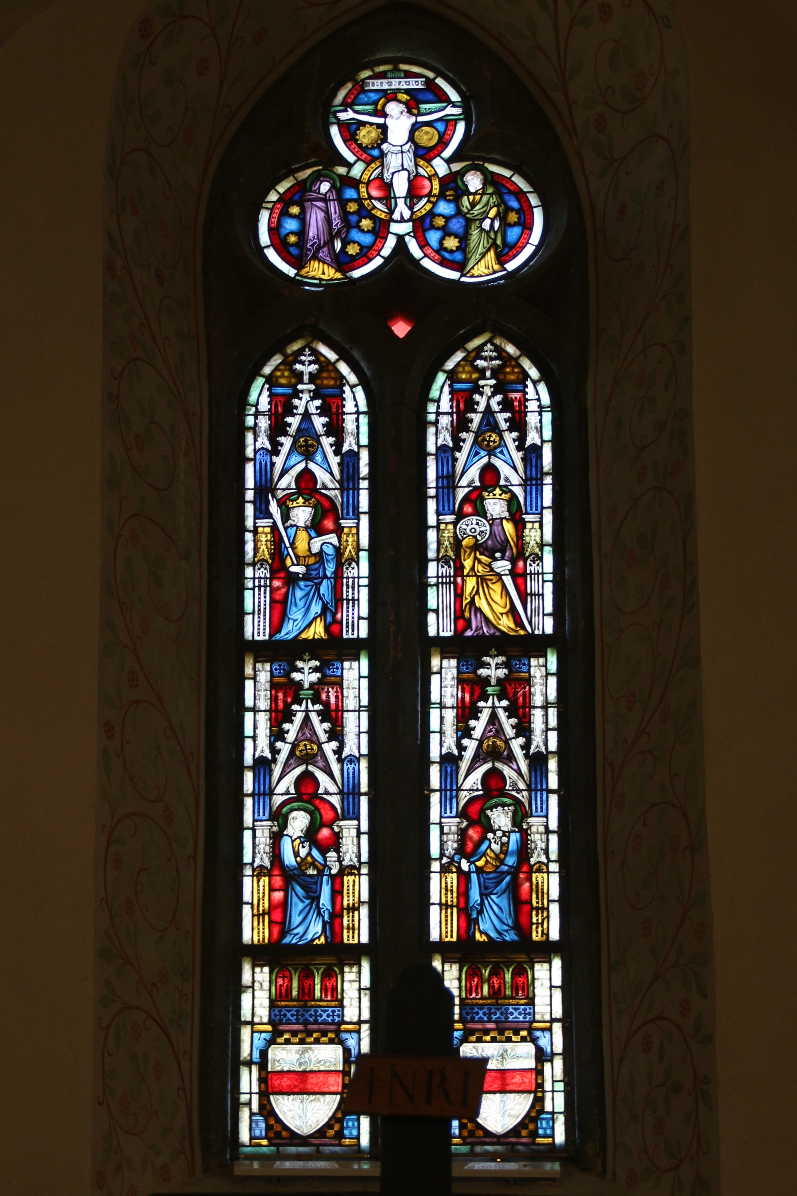 Kirche in Winnen